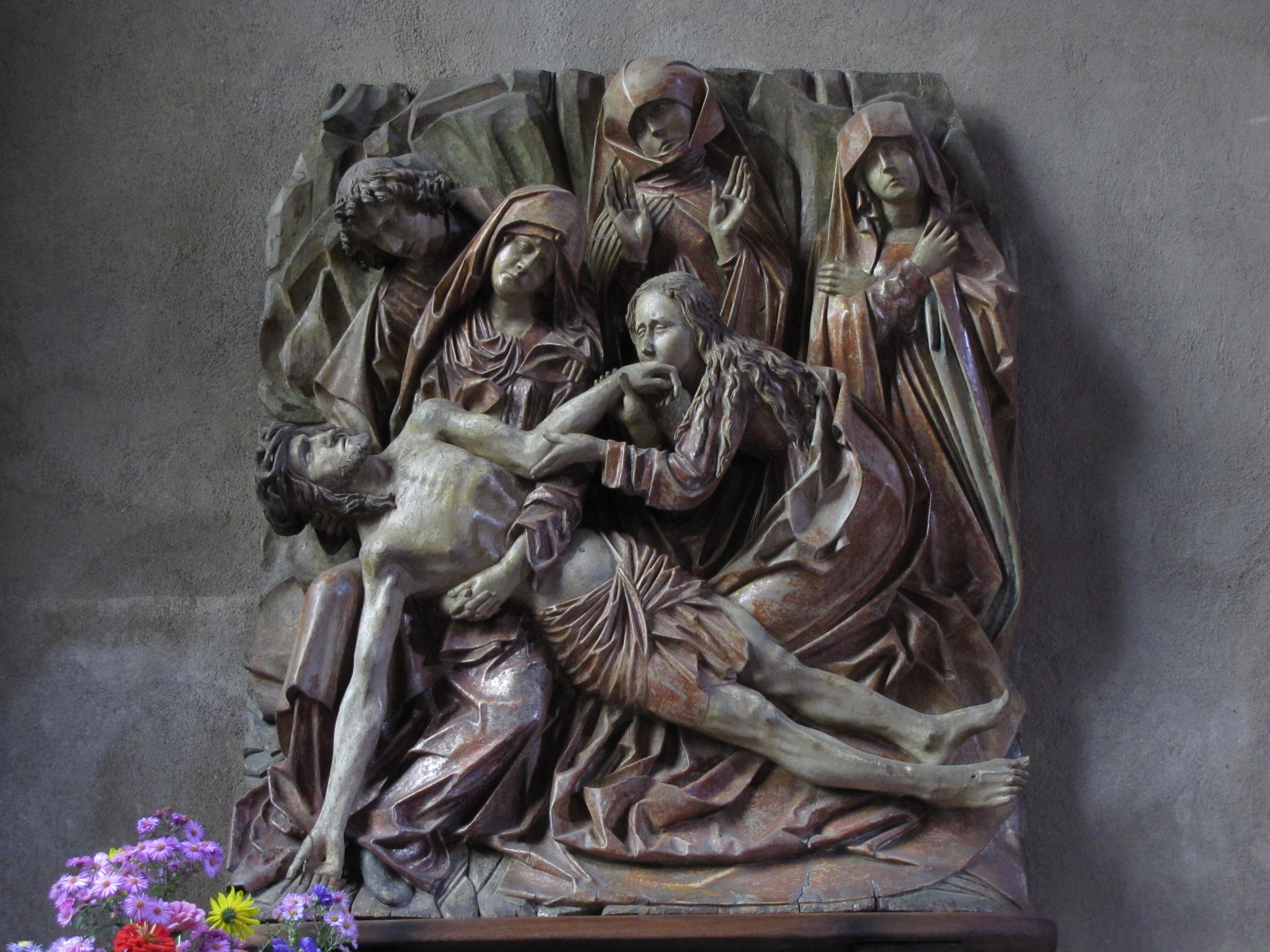 Alsace, Haut-Rhin, Église Sainte-Croix (XIIIe-XVe-XVIe) de Kaysersberg (PA00085477, IA68000563) Relief de la "Déploration" (XVIe): This object is classé Monument Historique in the base Palissy, database of the French furniture patrimony of the French ministry of culture, under the references PM68000164 and IM68006846.